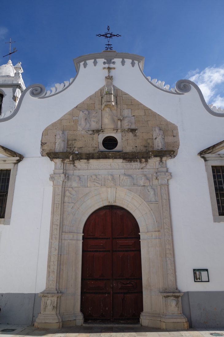 Portal da Igreja Matriz de Moncarapacho